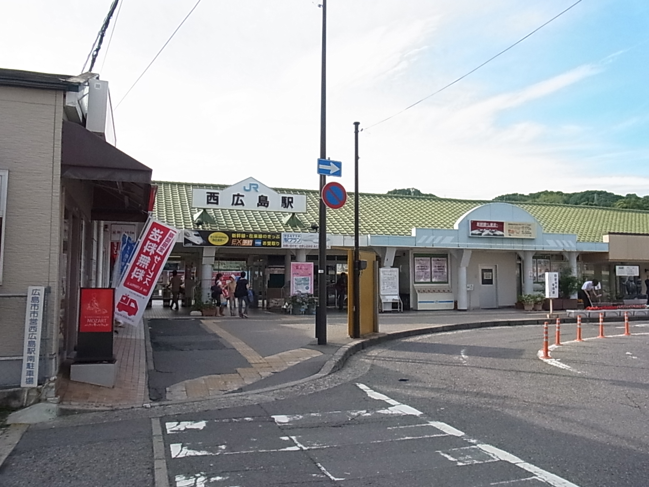 JR西広島駅 JR Nishi-Hiroshima Sta.